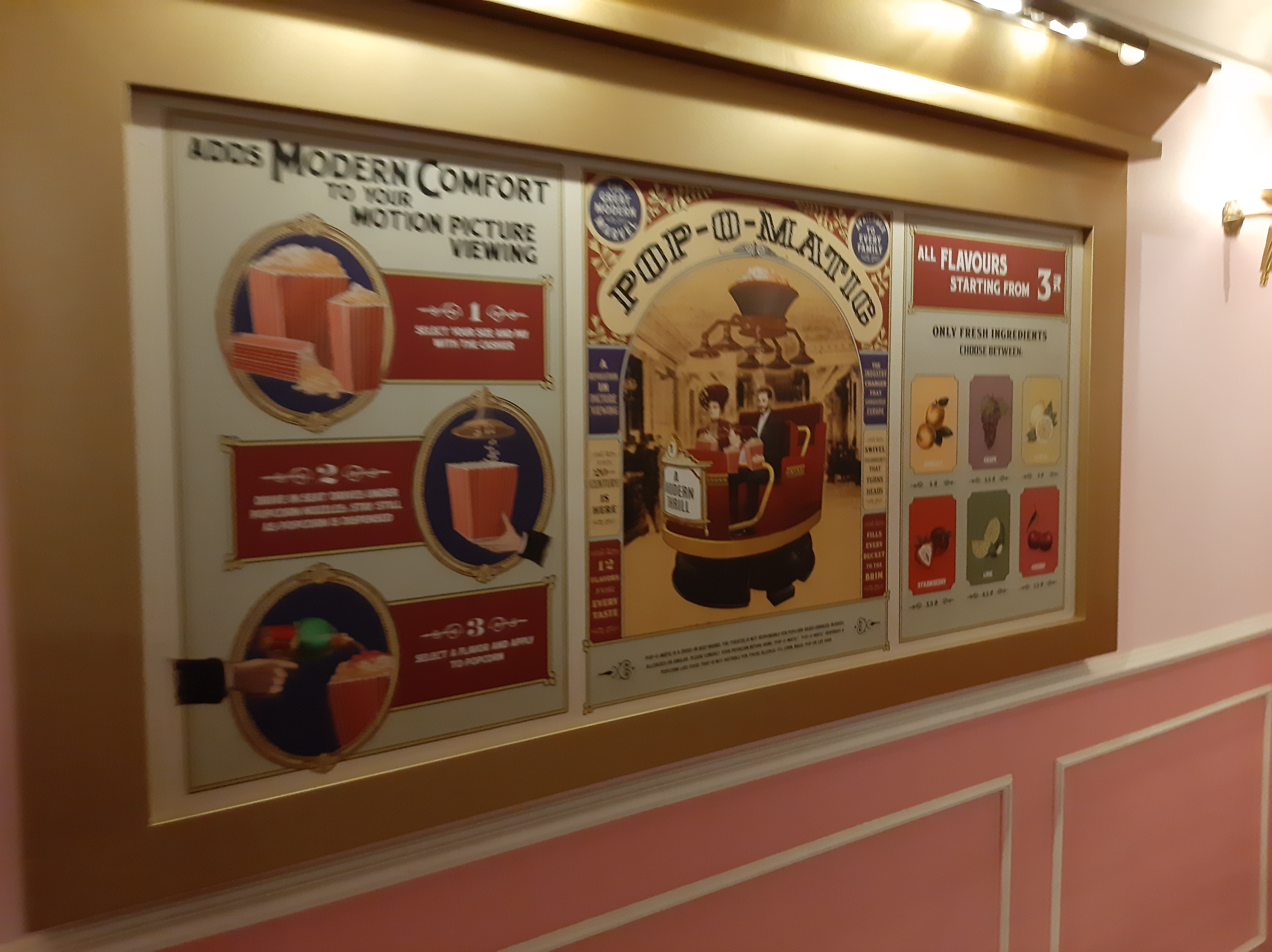 Darkride Popcorn Revenge in Walibi Belgium.